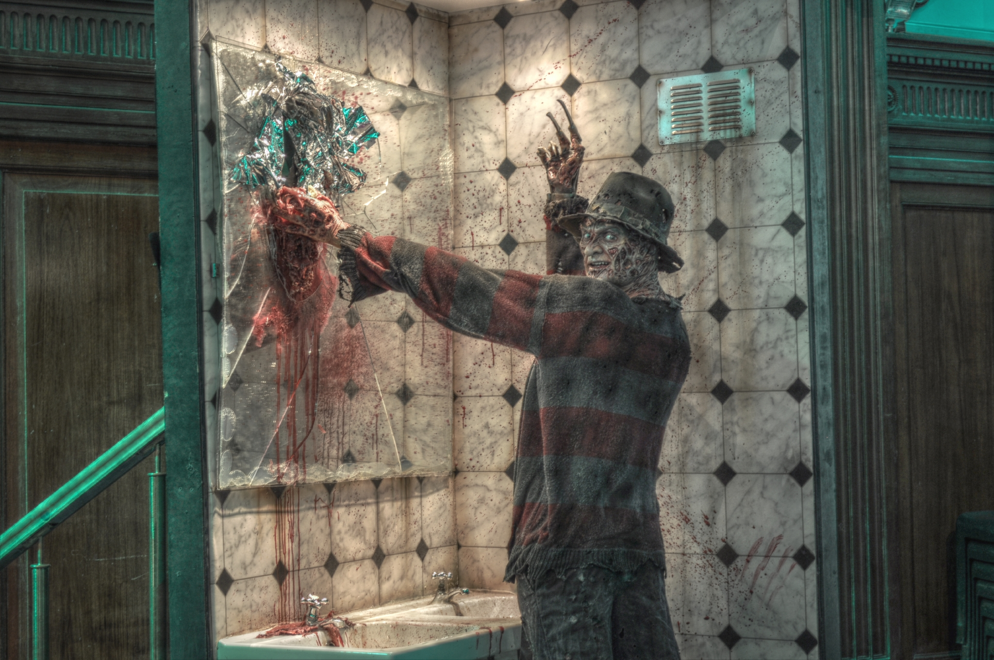 Camera: Nikon D5000 Luminance HDR, Mantiuk '06